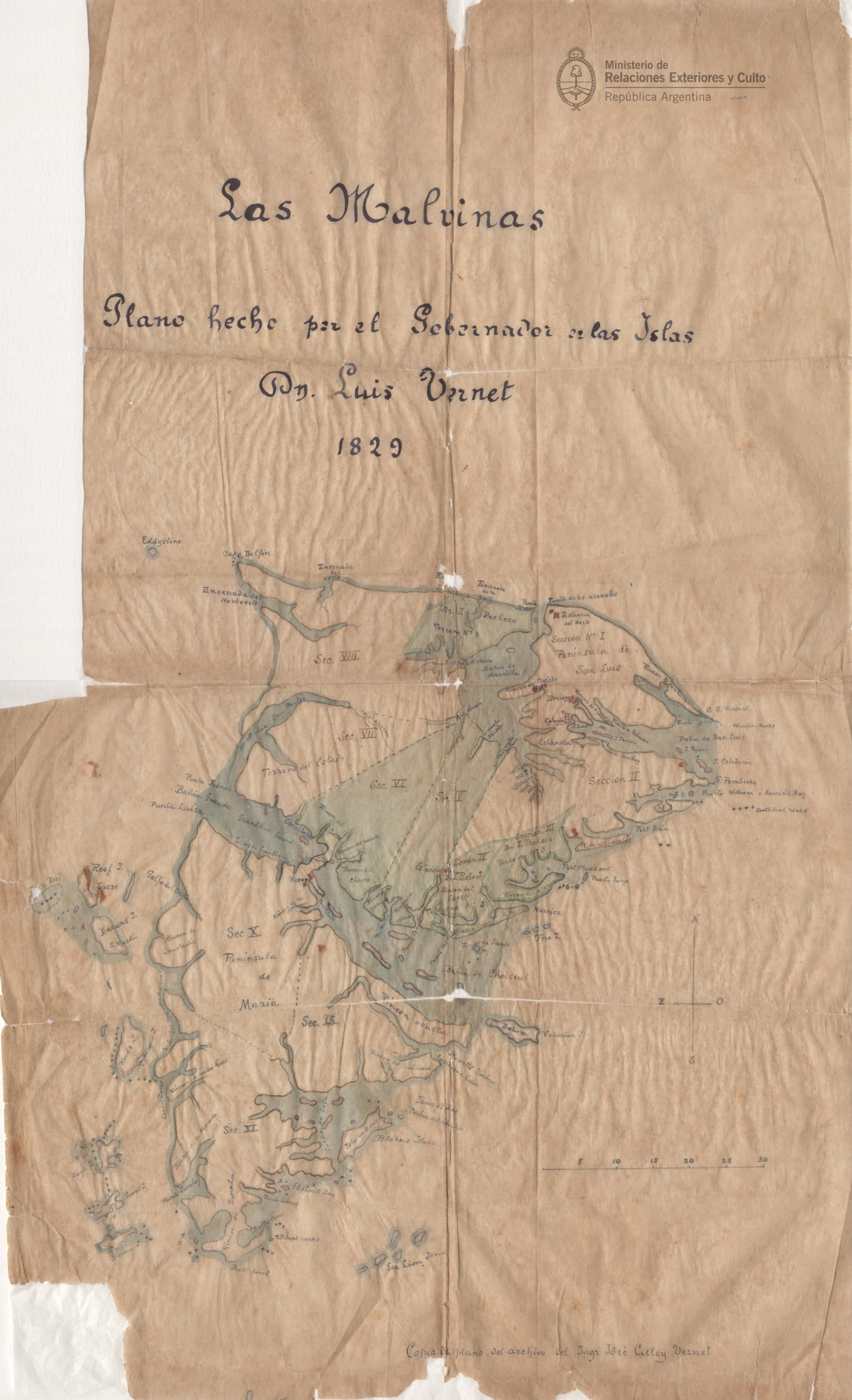 Plano de la isla Soledad hecho en 1829, por el Gobernador de las Islas Malvinas Luis Vernet. El documento está depositado en la Cancillería Argentina.